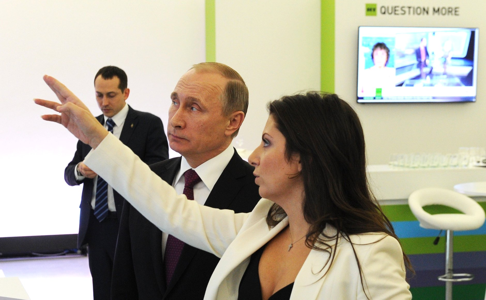 Владимир Путин на мультимедийной выставке, посвящённой 10-летию начала вещания телекомпании RTTV – Russia Today. С главным редактором телеканала Маргаритой Симоньян